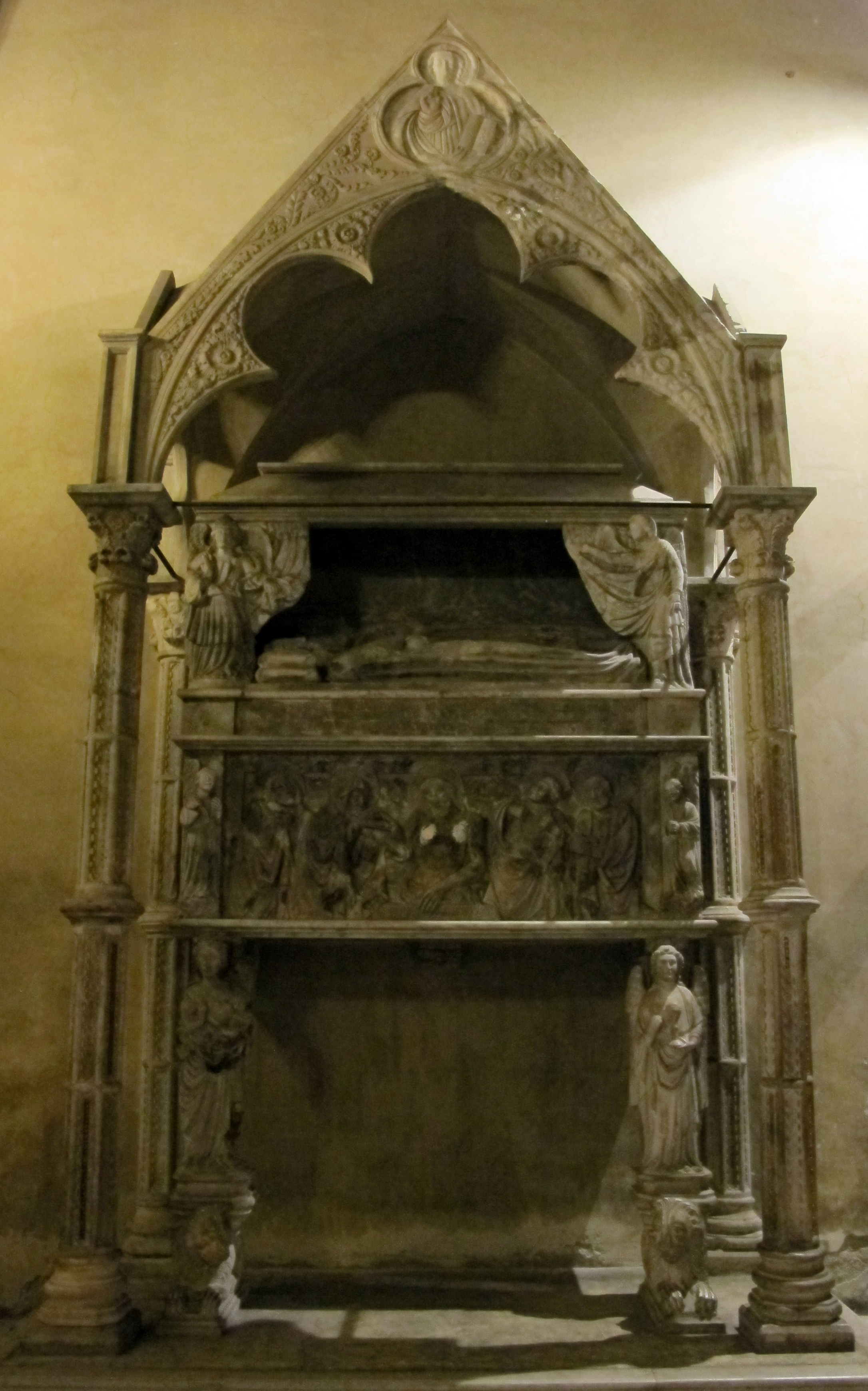 Santa Chiara, Napoli